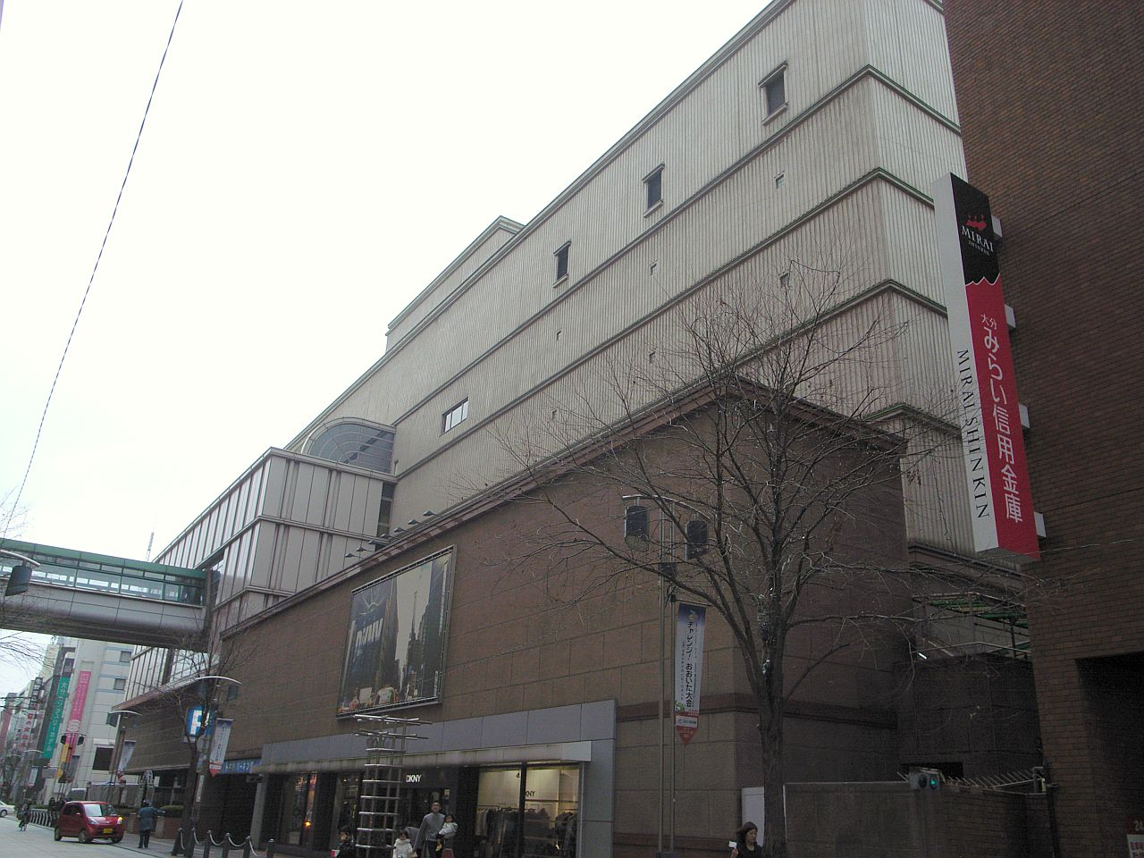 Tokiwa Kaikan, Oita City, Oita Pref., Japan / トキハ会館（大分県大分市）